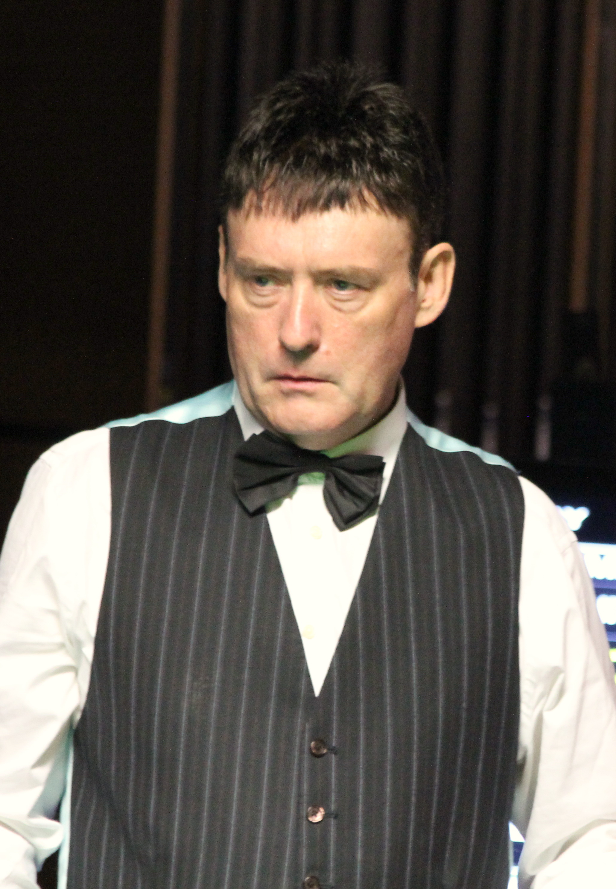 Jimmy White beim Paul Hunter Classic 2016